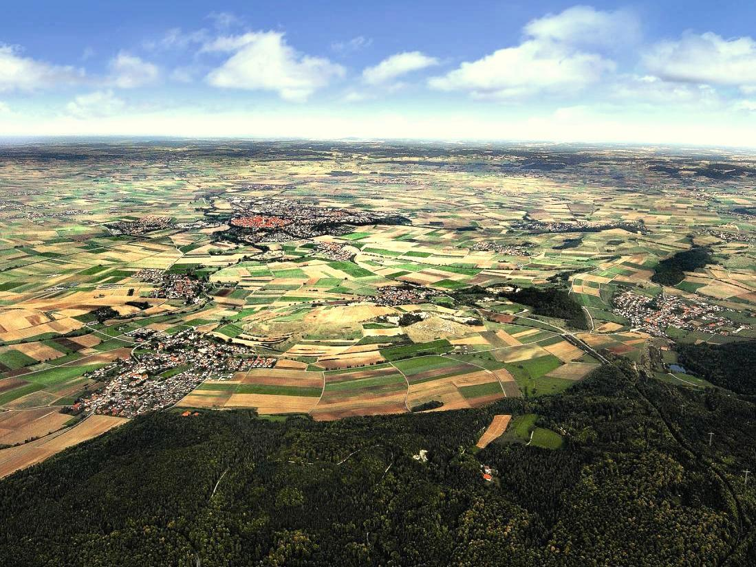 Luftbild vom Nördlinger Ries 2009